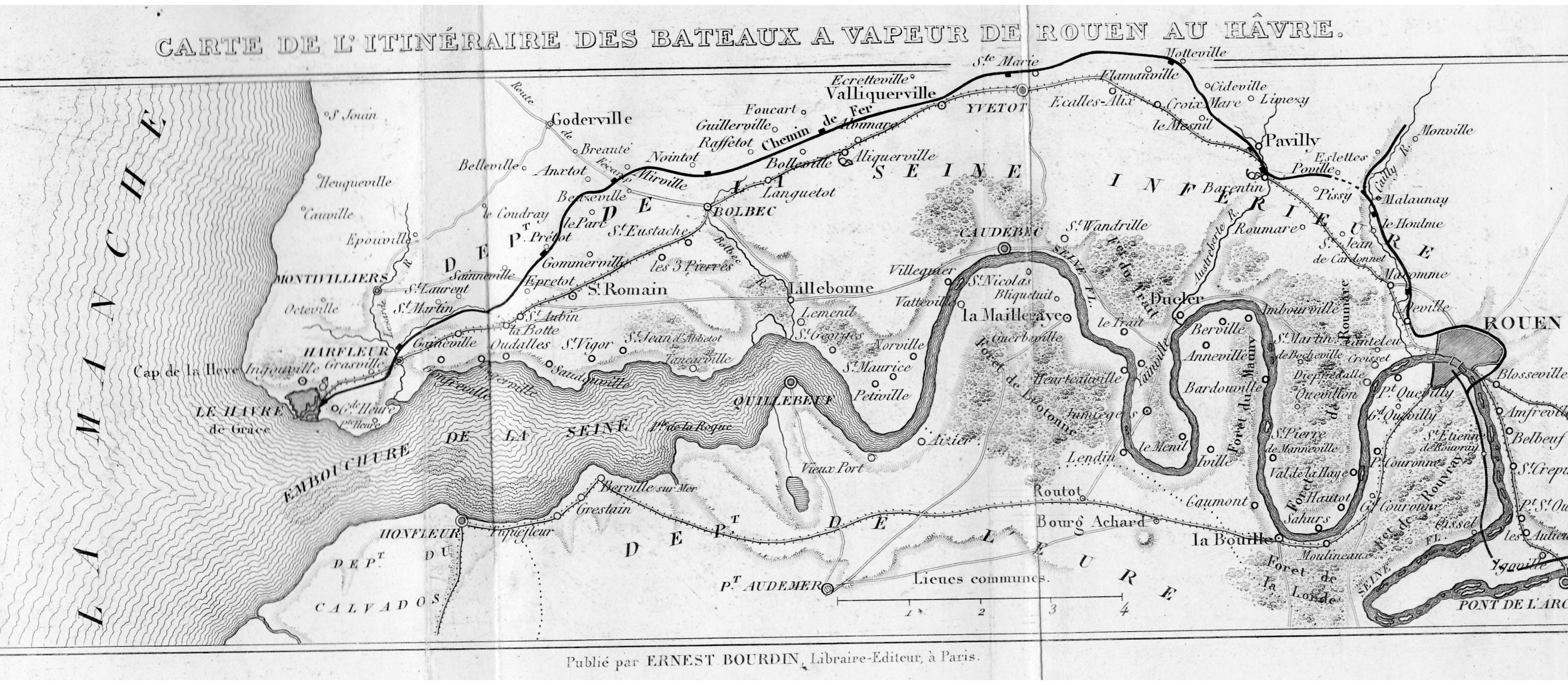 Carte du chemin de fer de Rouen au Havre.